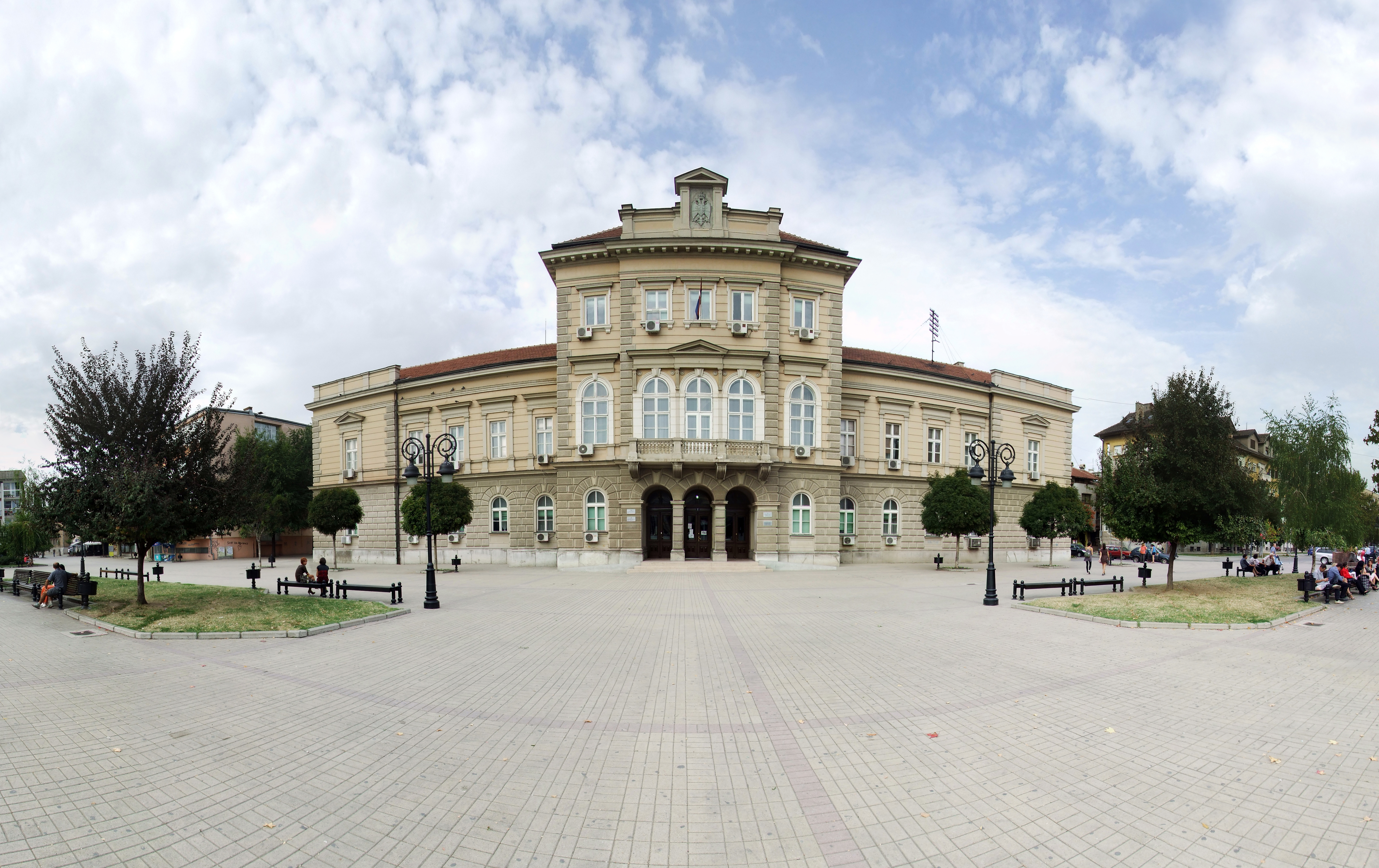 Zgrada Okružnog suda u Smederevu, koja se nalazi na centarlnom gradskom tru.